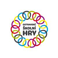 Logo OŠH